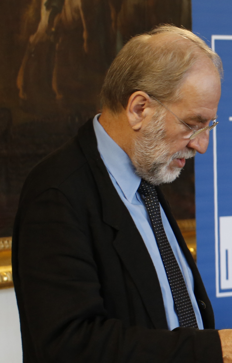 Manfred Prisching auf der Fachtagung des RPP-Institutes über "Selbstverwirklichung & Gehorsam" am 7. Dezember 2012 im Kaisersaal des Stiftes Heiligenkreuz